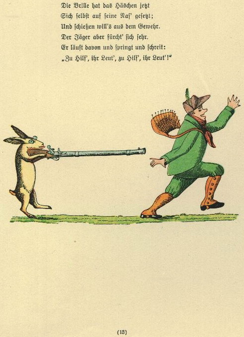 Der Struwwelpeter: Die Geschichte vom wilden Jäger Tafel 2